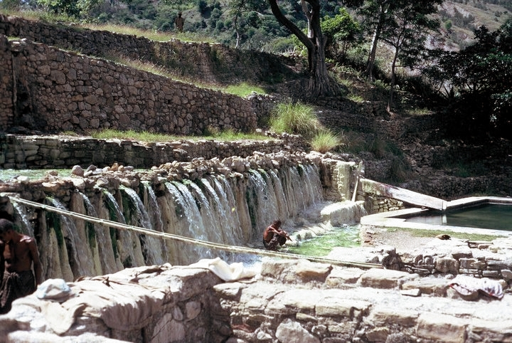 As nascentes de águas sulfurosas quentes e a piscina